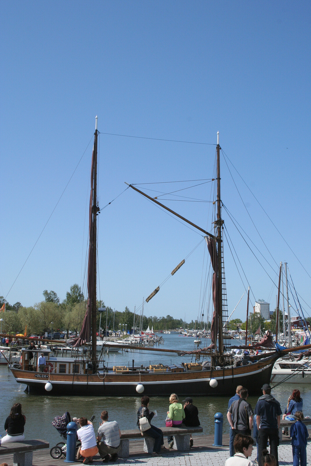 Kaljaasi Olga kaupunginlahdessa, Uudessakaupungissa